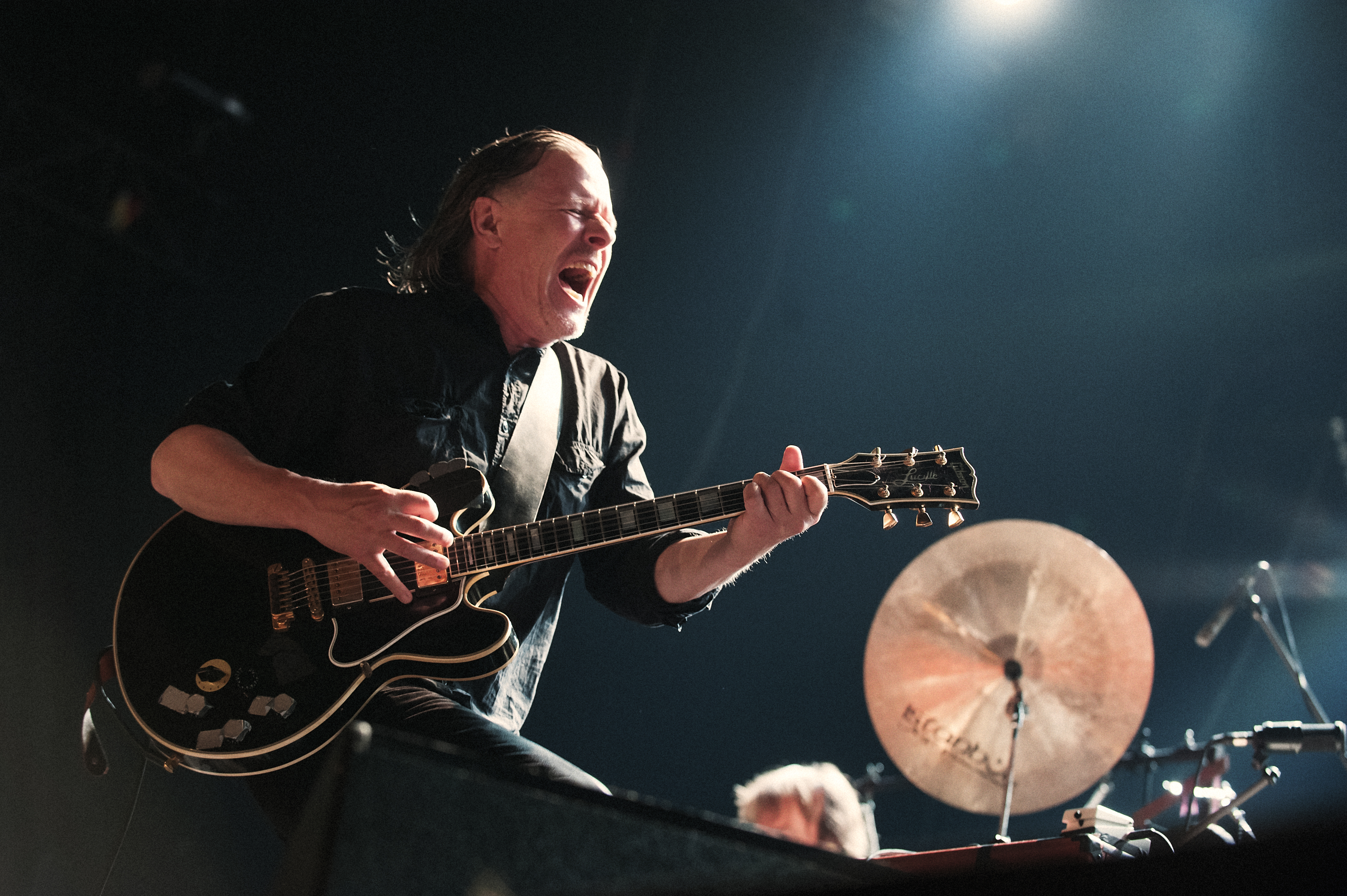 Swans na OFF Festivalu 2012